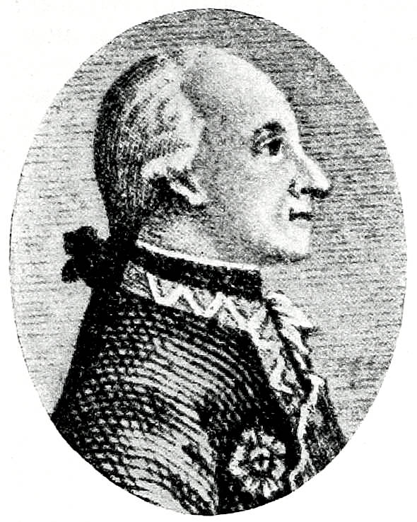 Эта фотография была использована для иллюстрирования статьи «Кобург-Заальфельд, Фридрих-Иосия, принц, герцог Саксонский» опубликованной в тринадцатом томе «Военной энциклопедии», который был издан книгоиздательским товариществом И. Д. Сытина в 1913 году в столице Российской империи городе Санкт-Петербурге. Более подробное описание к этой картинке можно прочесть в указанной выше статье.